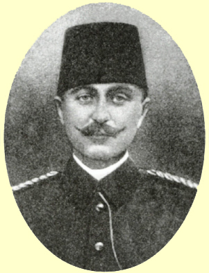 Çanakkale Müstahkem Mevkii Komutanı Albay Cevat Bey (1870-1938)